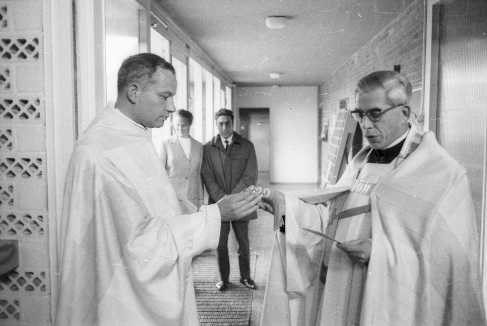 Der katholische Landesdechant Josef von de Berg (rechts) übergibt den Schlüssel für die Kirche am Wildhof an Pfarrer Wilm Sanders.